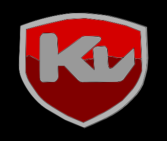 Logo de las motocicletas Kurazai